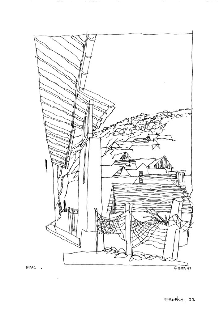 Magyarbikal, Erdély (útirajz)